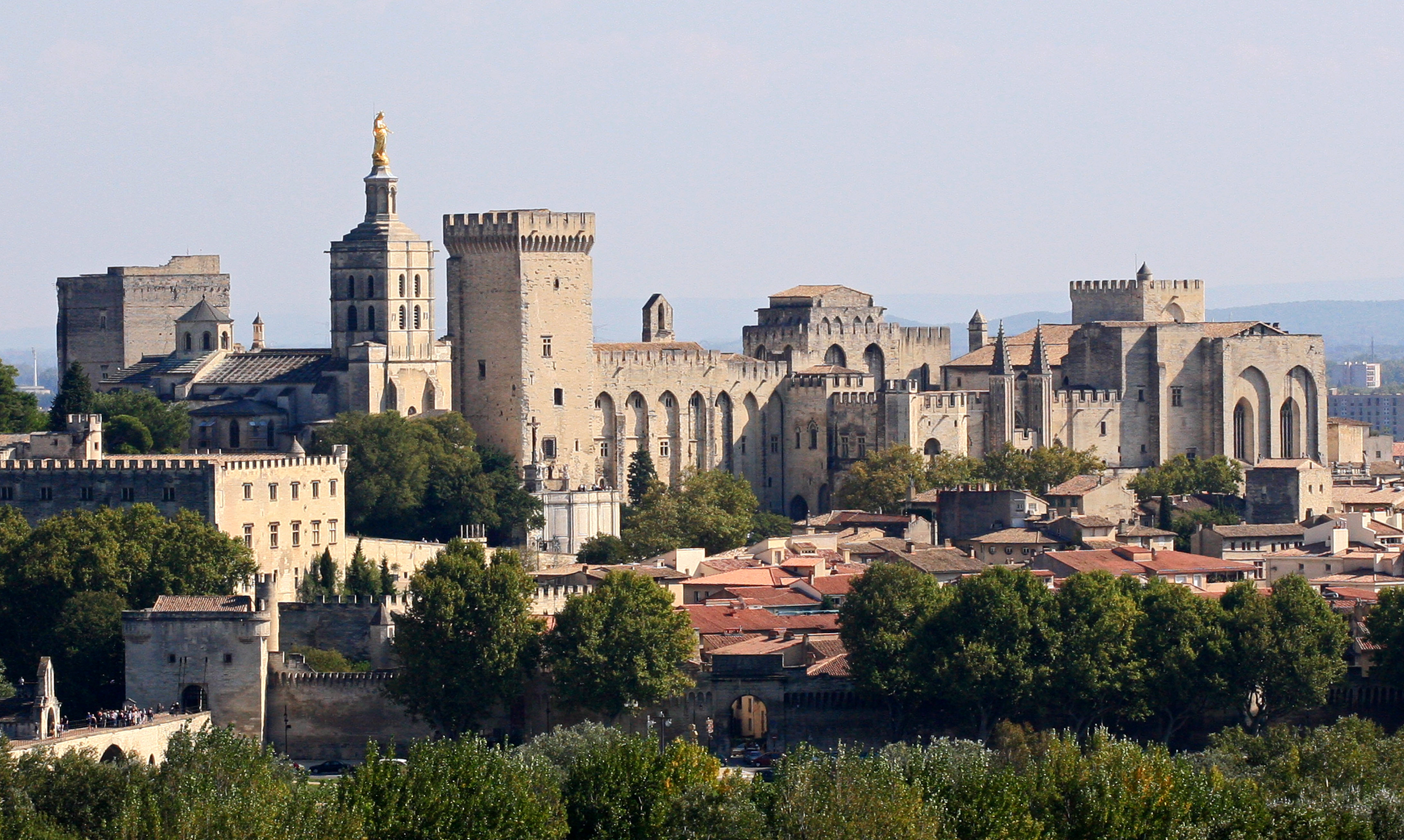 Avignon, Palais des Papes depuis Tour Philippe le Bel